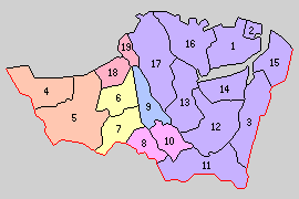 福岡県遠賀郡の町村制時点の町村。